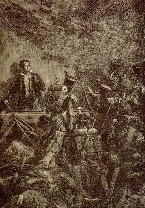 Enjolras é capturado e fuzilado pelo exército